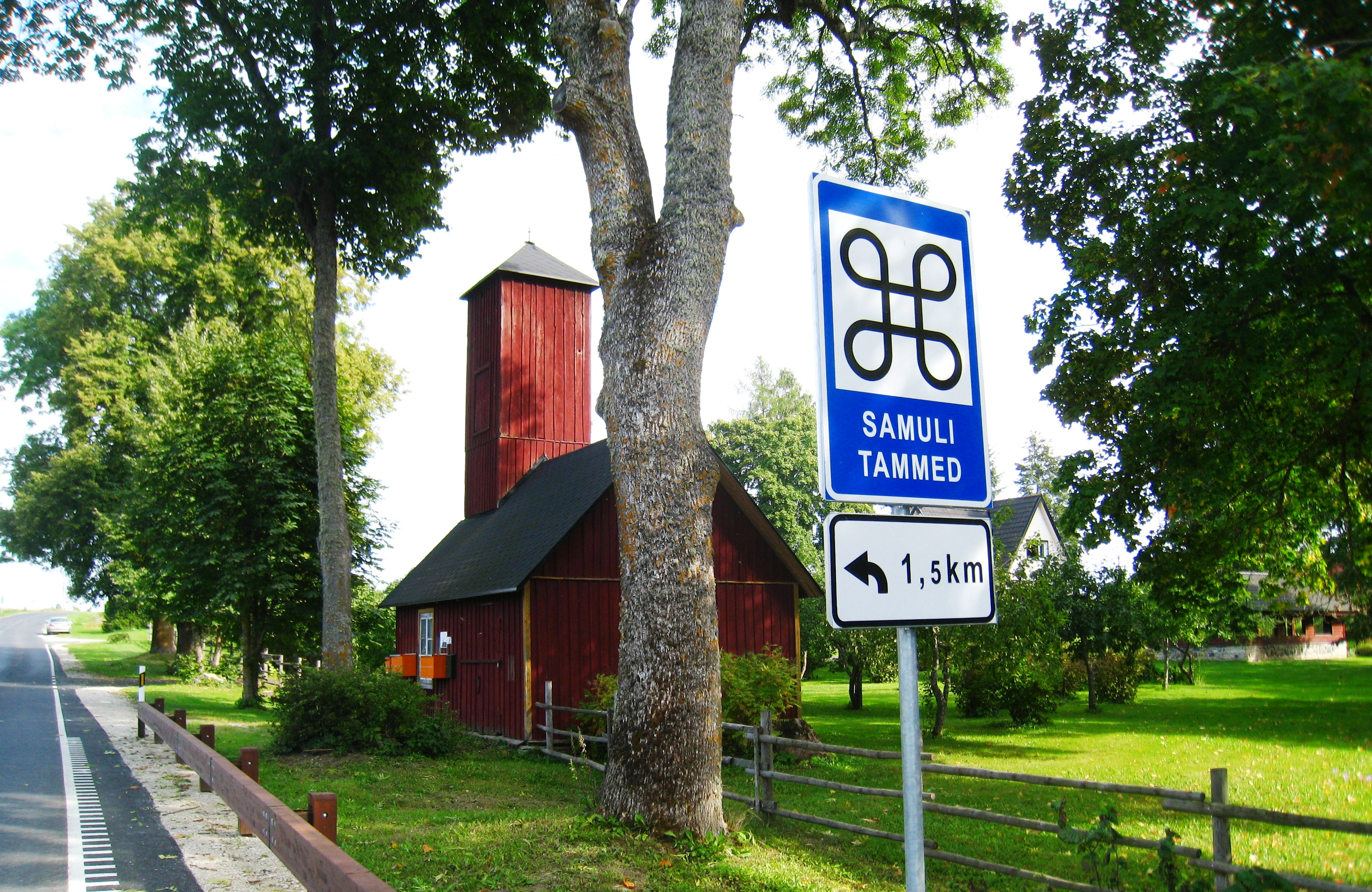 Soorinna 80 aastat vana pritsikuur.